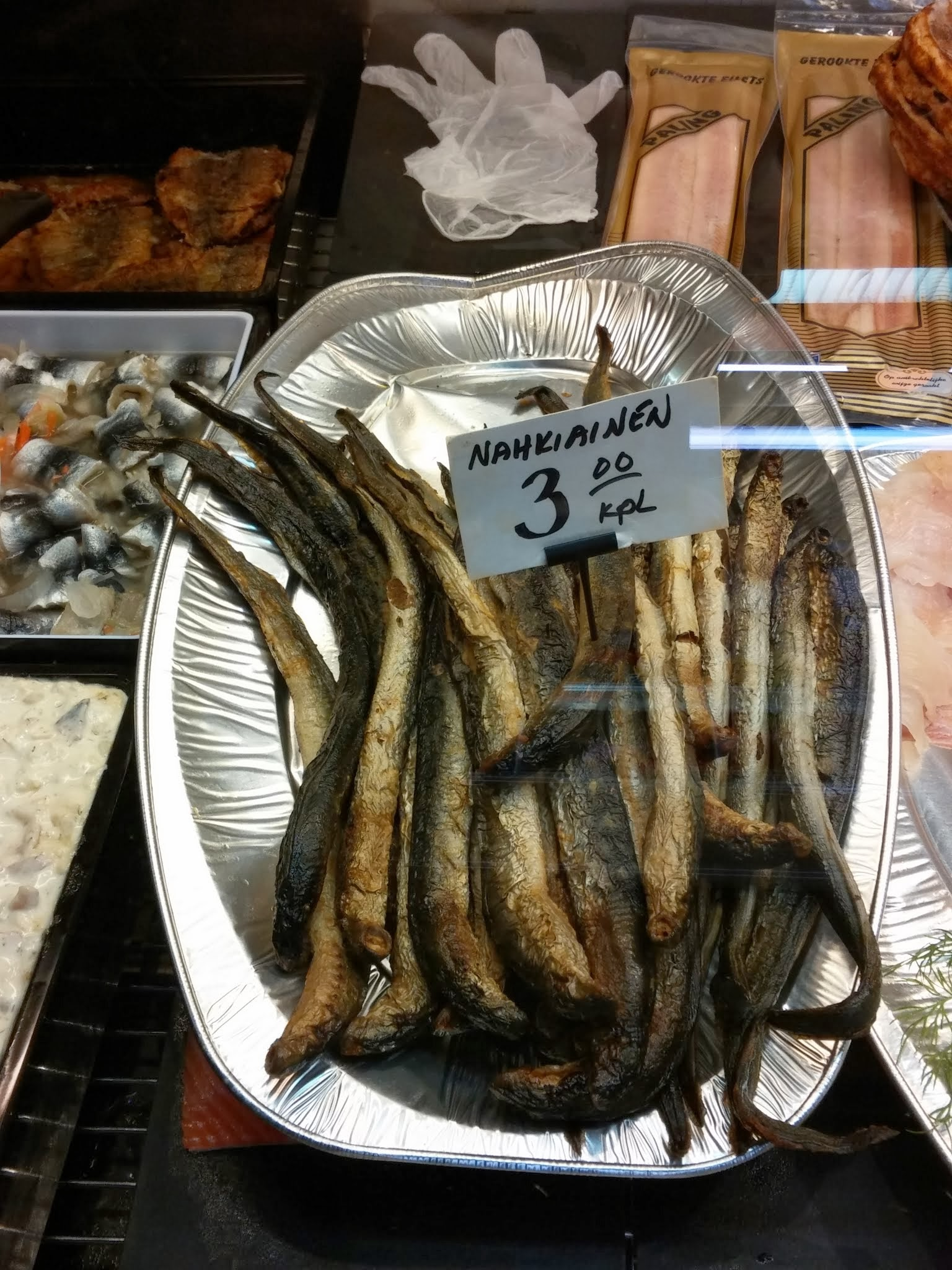 Lampreys